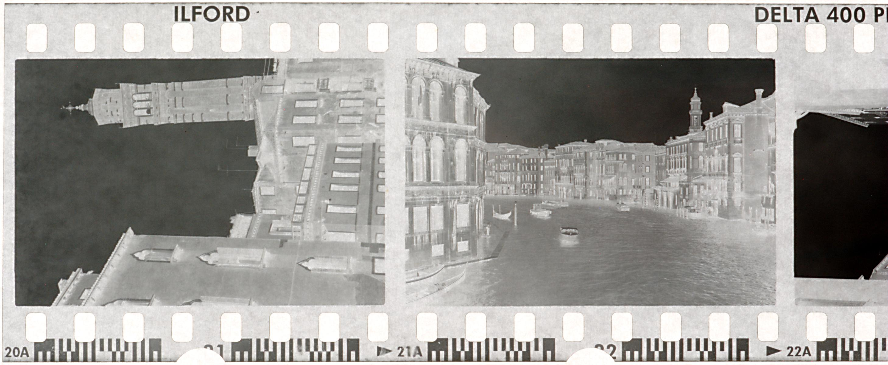 Beispiel eines Schwarz-Weiß-Negativ-Filmstreifens, Kleinbild, Ilford Delta 400P